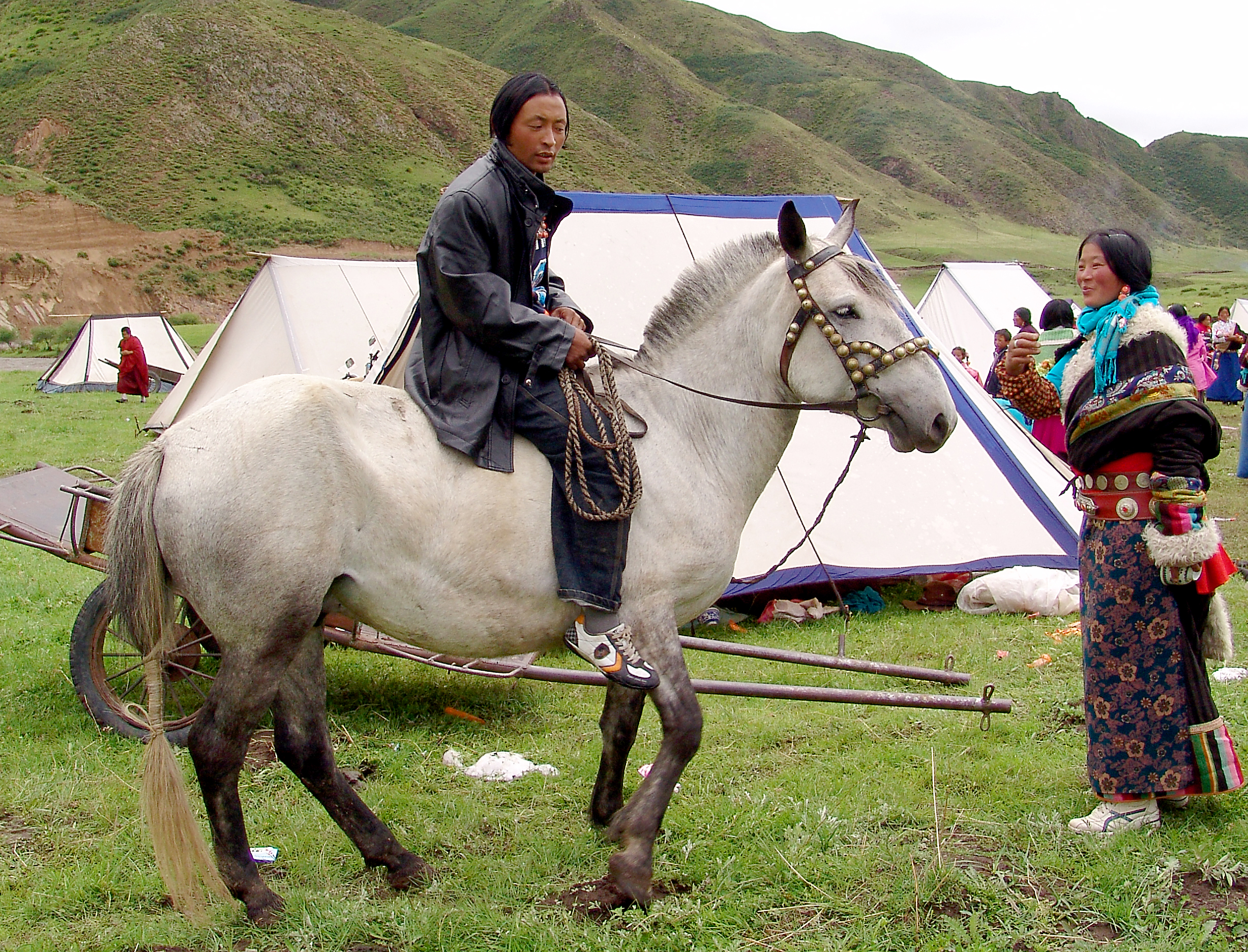 Nomade tibétain à Gansu, Chine.